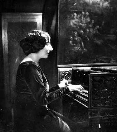 Wanda Landowska during a concert in Lwów (Lviv - then Poland, now Ukraine), Wanda Landowska